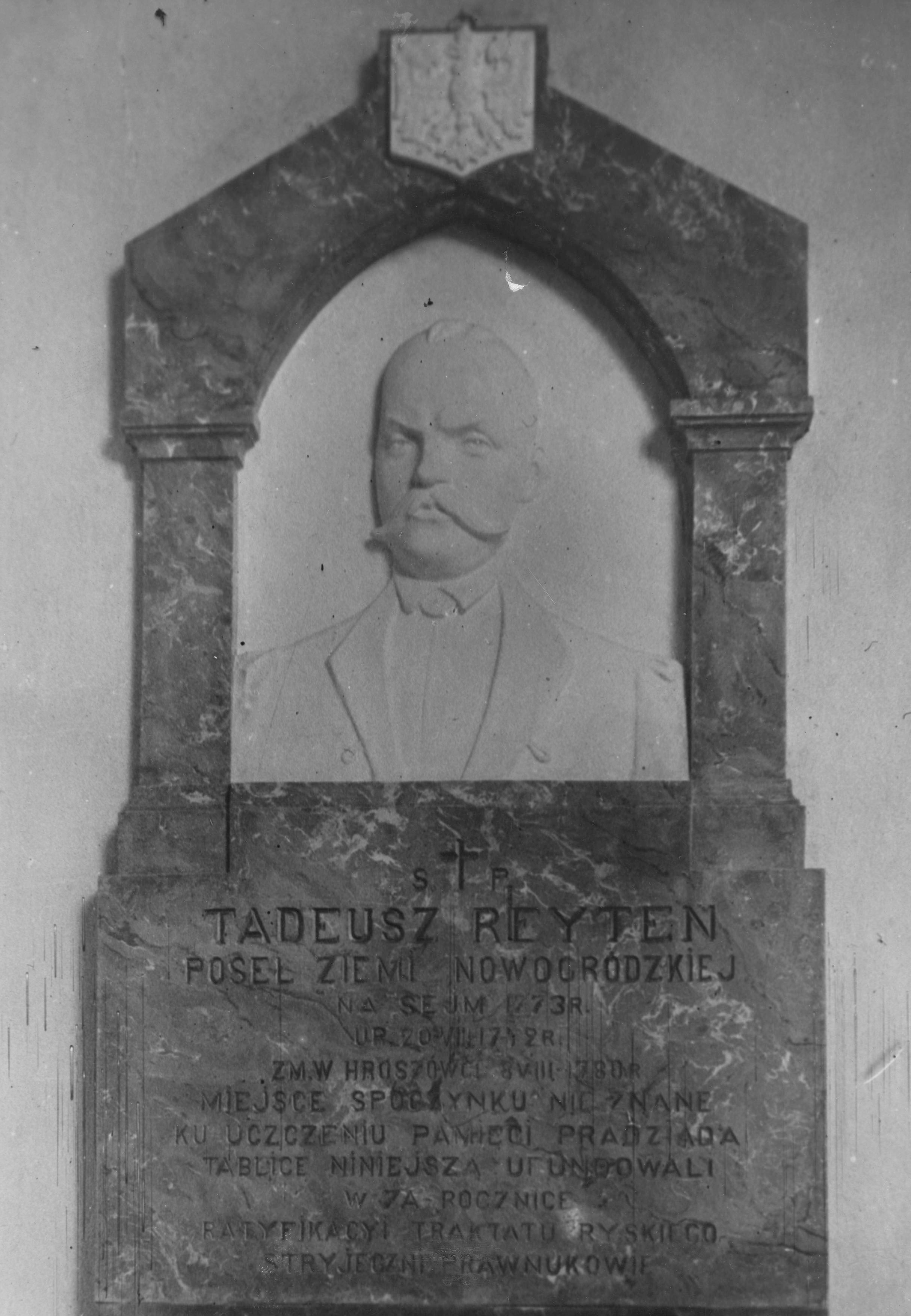 Беларуская (тарашкевіца): Грушаўка (Hrušaŭka), капліца-пахавальня. Барэльеф Тадэвушу Рэйтану (Tadevuš Rejtan)